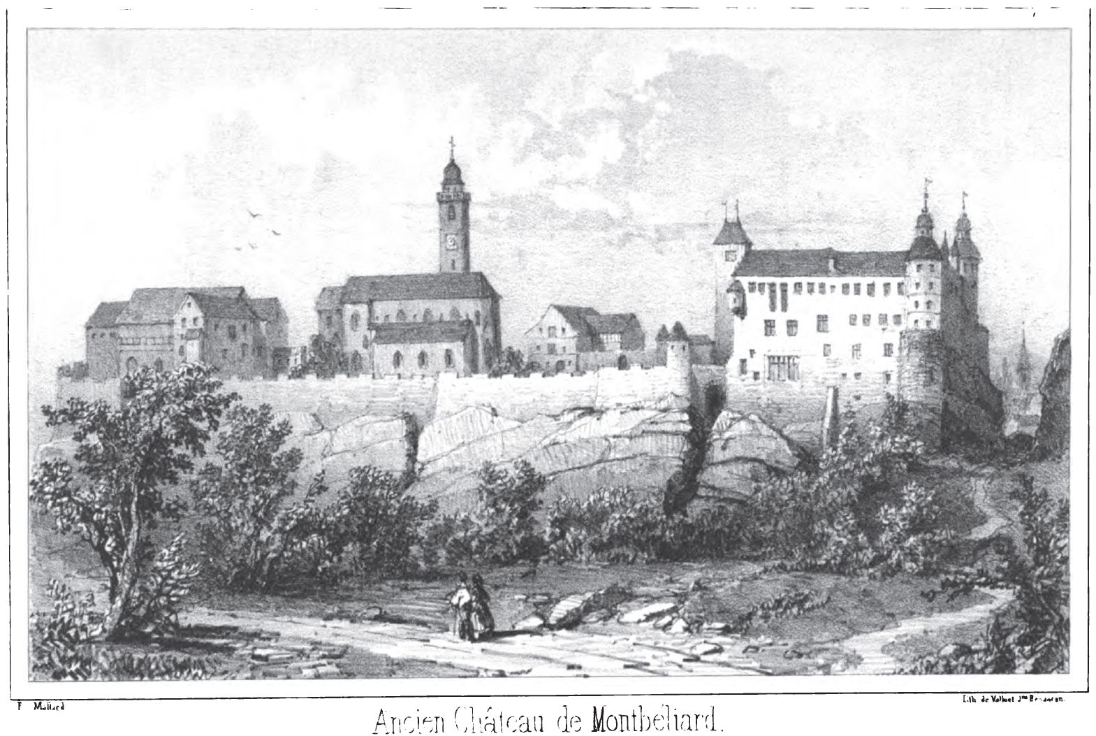 Gravure représentant le château de Montbéliard